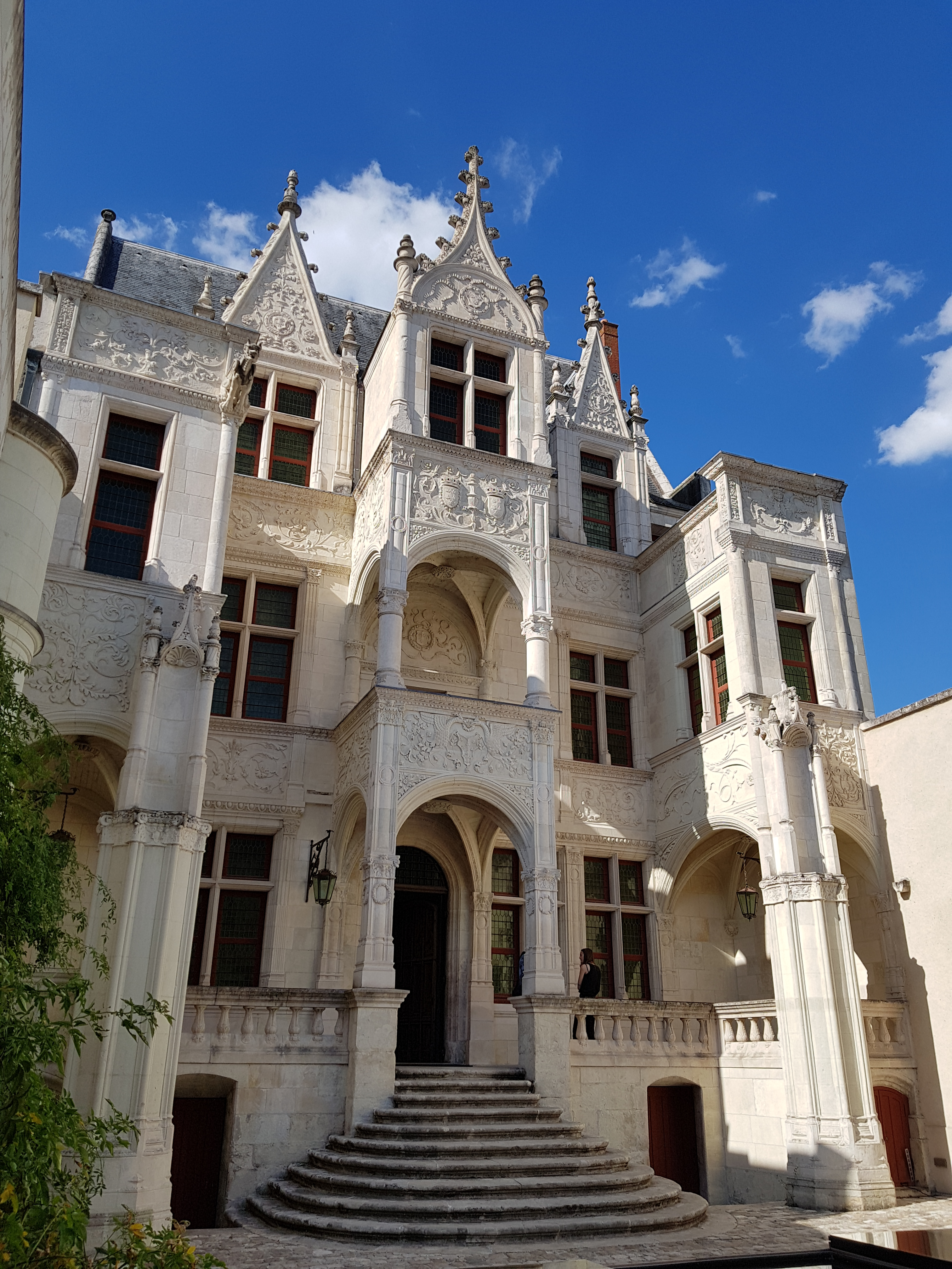 hôtel Gouin XVe et XVIe siècle , façade sud rue du Commerce